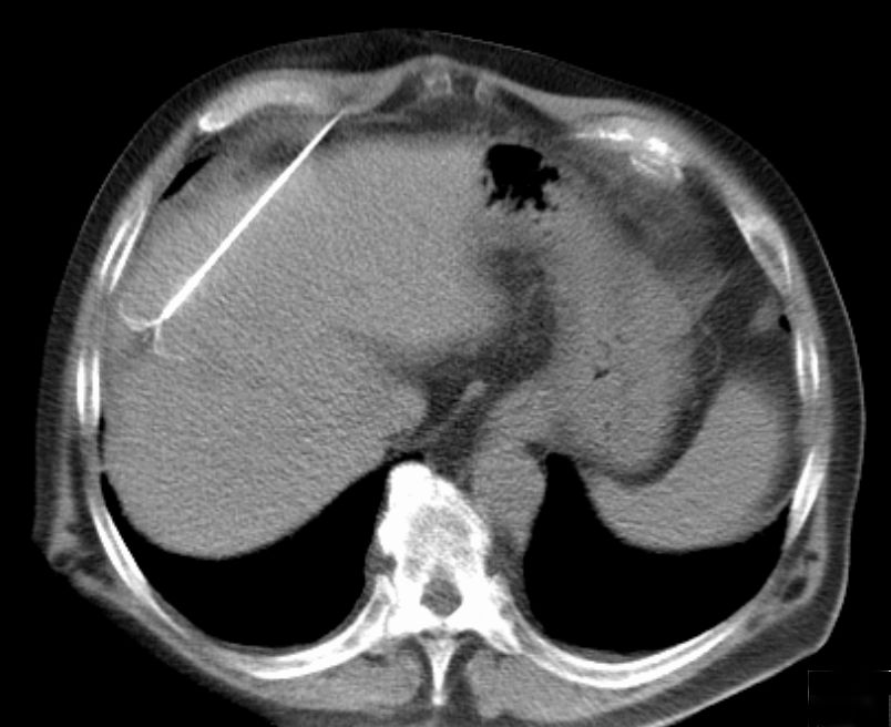 Radiofrequenzablation eines Leberherdes. Kontrolle der Position mit ausgefahrenem Schirm. Das Bild ist als 15mm-Schicht gerechnet, um die einzelnen Schirmarme zu zeigen. Die Nadel liegt nicht genau in der Ebene des CT-Bildes, so dass die Eintrittsstelle durch die Haut nicht mit abgebildet ist.